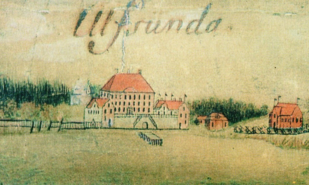 Detalj från Gripenhielms Mälarkarta, Ulvsunda